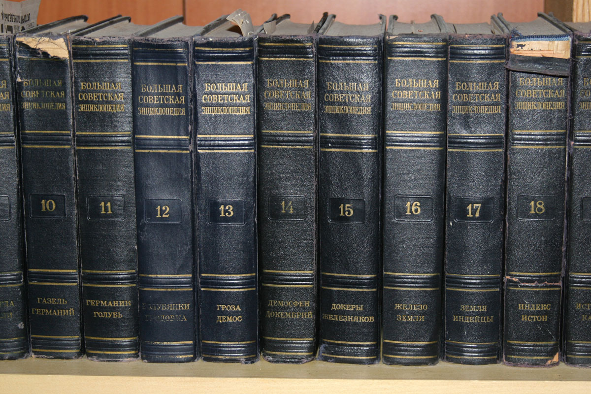 Тома второго издания Большой советской энциклопедии на книжной полке